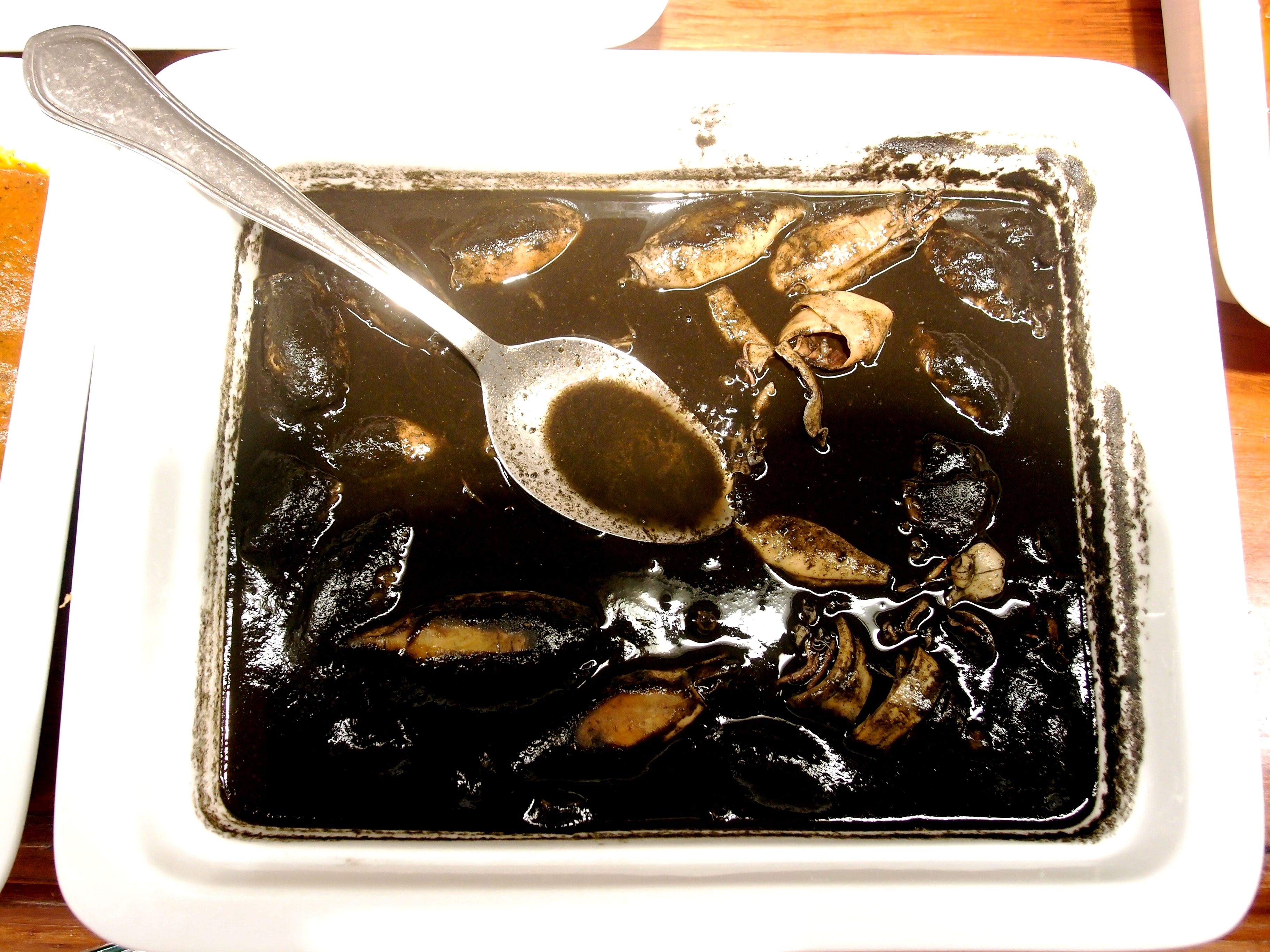 Chipirones en su tinta (Kalmare in eigener Tinte) - traditionelles Gericht der baskischen/span. Küche Datum: 07.05.2014 Urheber: M.Pfeiffer alias Gordito1869 Quelle: privates Fotoalbum des Urhebers